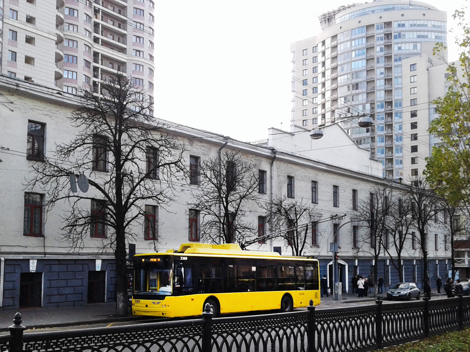 Київ. Колишній будинок київських арештантських рот, 1849 р.